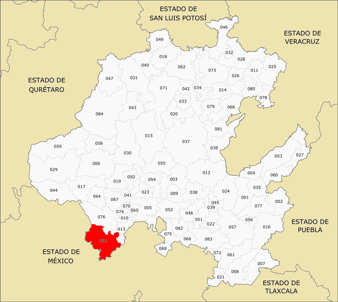 Municipios de Hidalgo